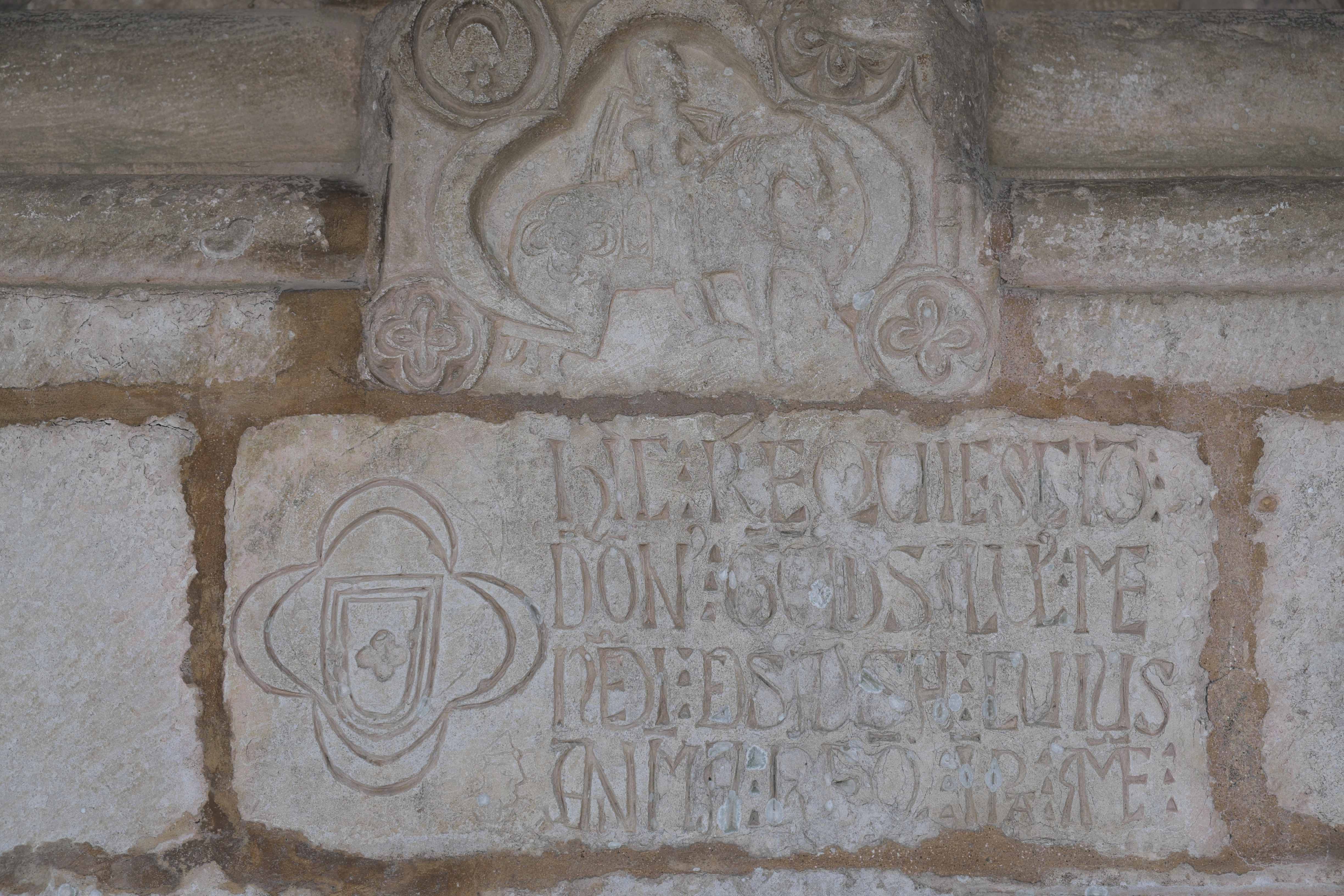 Ehemaliges Zisterzienserklosters Santa Maria de Alcobaça in Alcobaça im Distrikt Leiria (Portugal), Inschrift